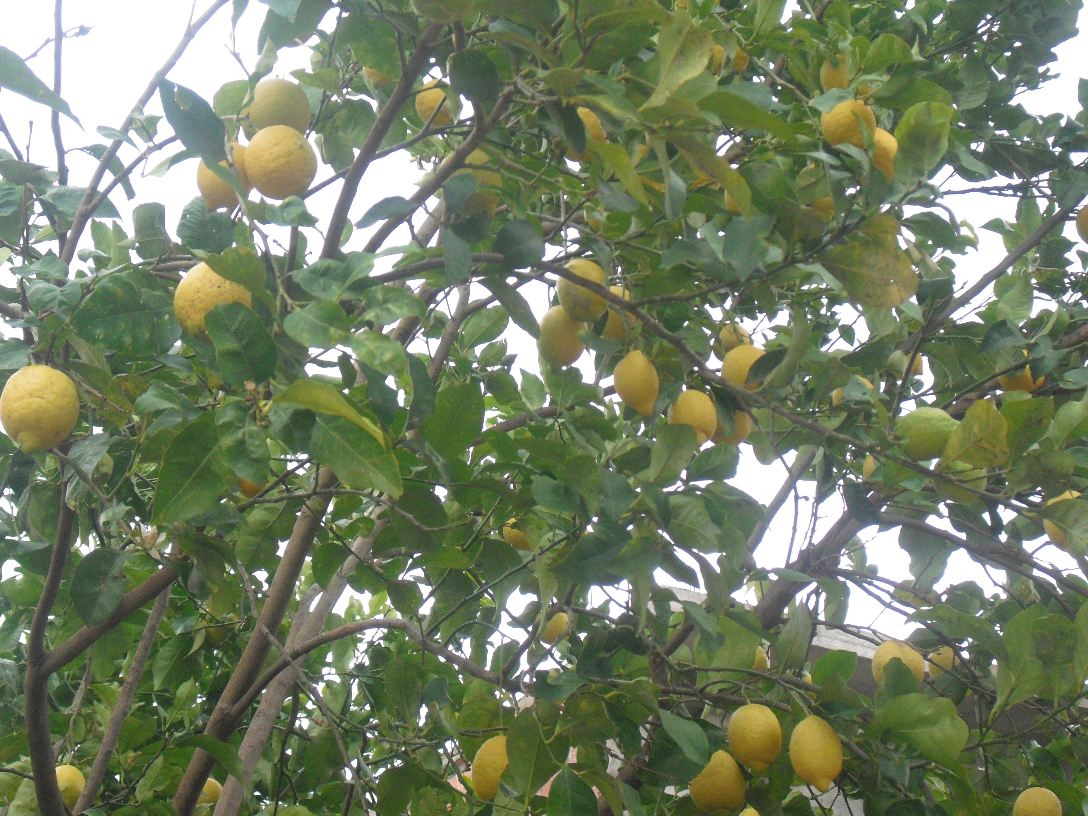 Citronnier à Taher, Wilaya de Jijel (Algérie)